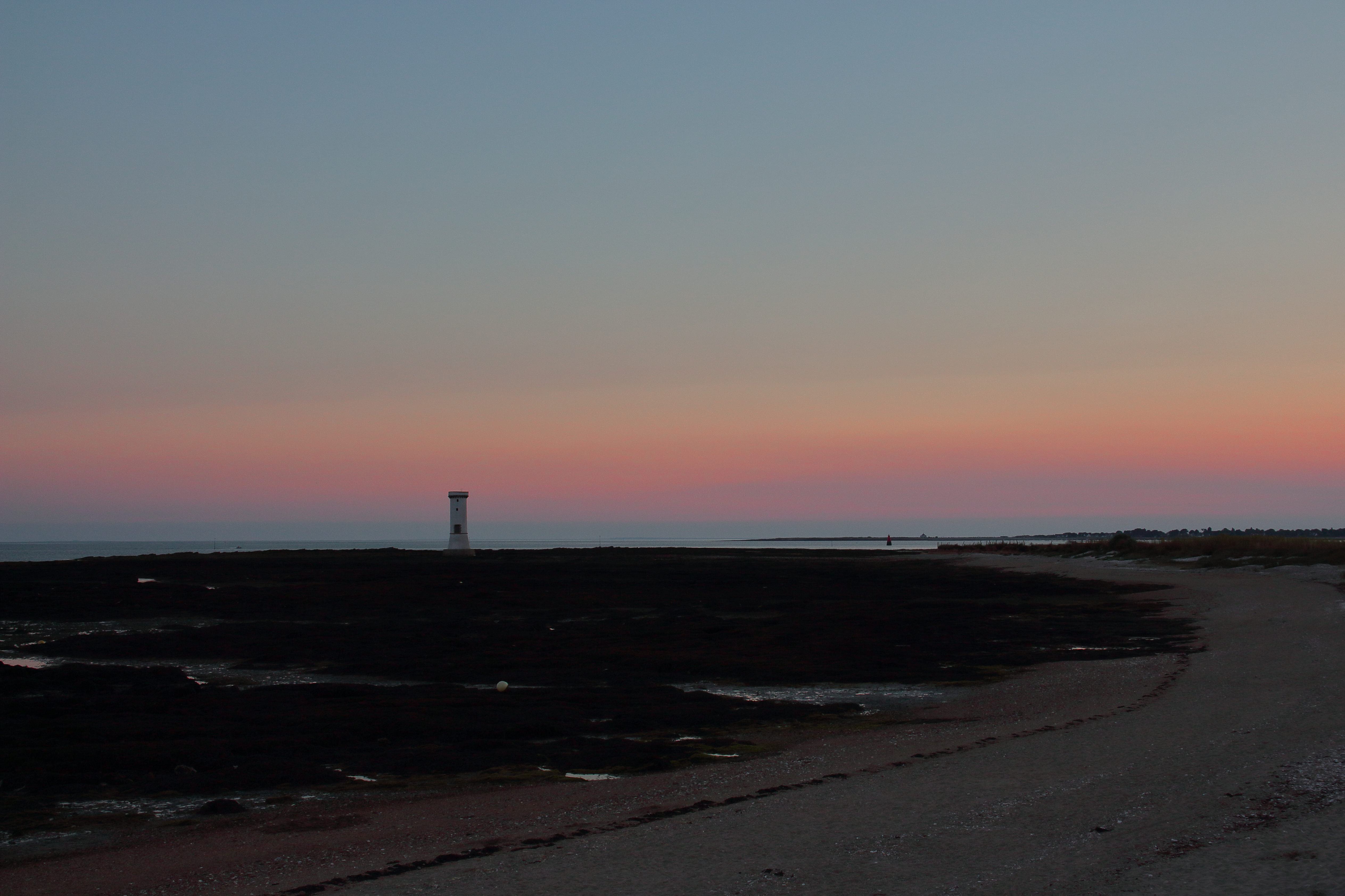 Der Leuchtturm "Le Tour des Anglais" vor "Le Lenn" auf der Halbinsel "Penerf" bei Damgan (Morbihan, Bretagne) in der Abenddämmerung